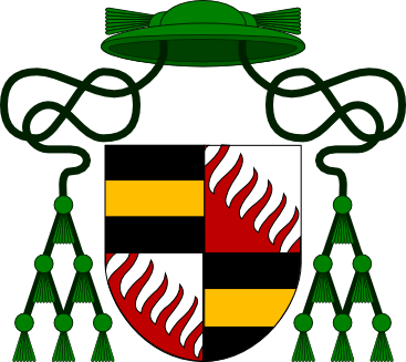 znak arcibiskupa Olbrama ze Škvorce